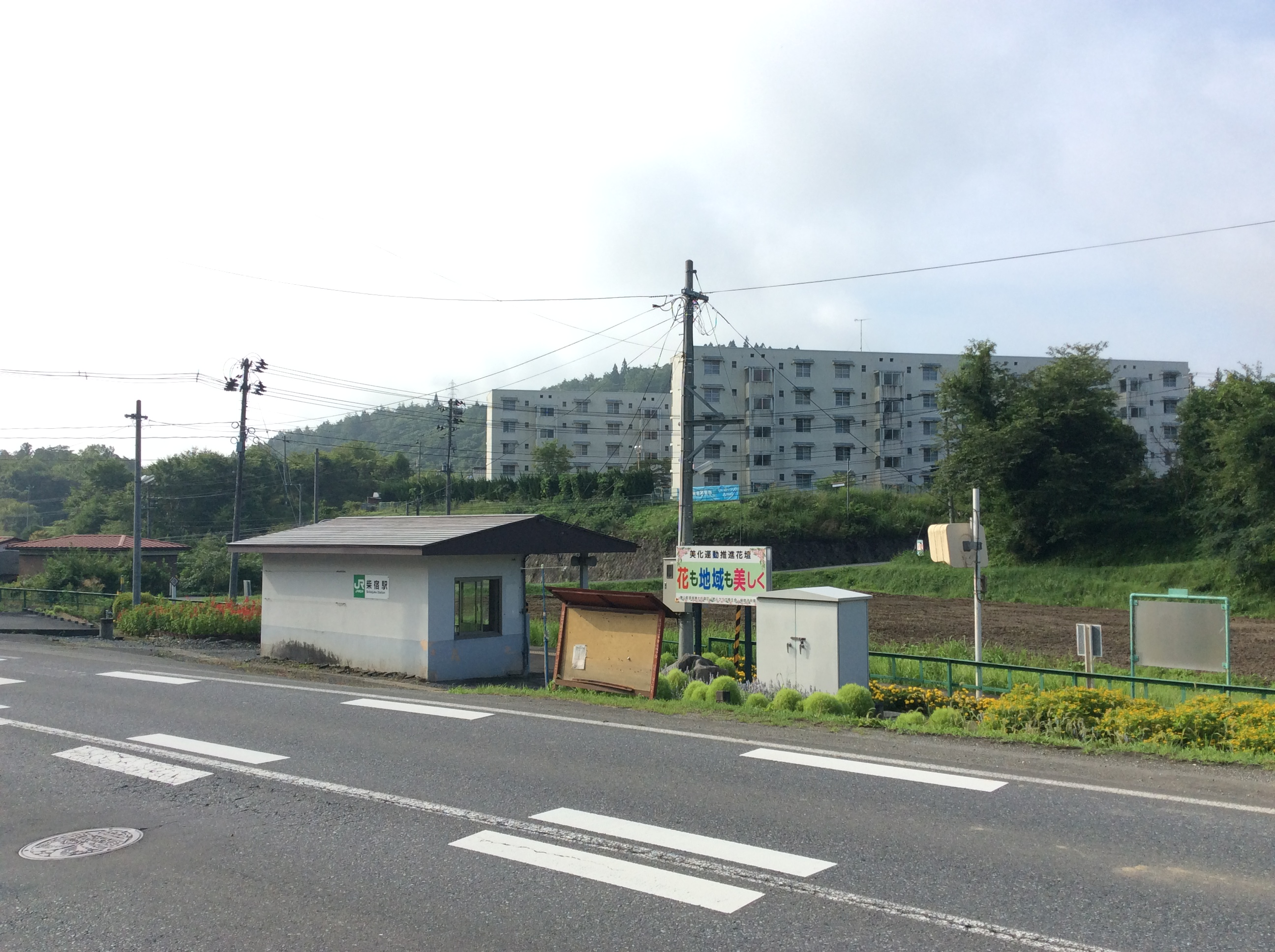 日本岩手県一関市東山町長坂字柴宿にある東日本旅客鉄道大船渡線柴宿駅